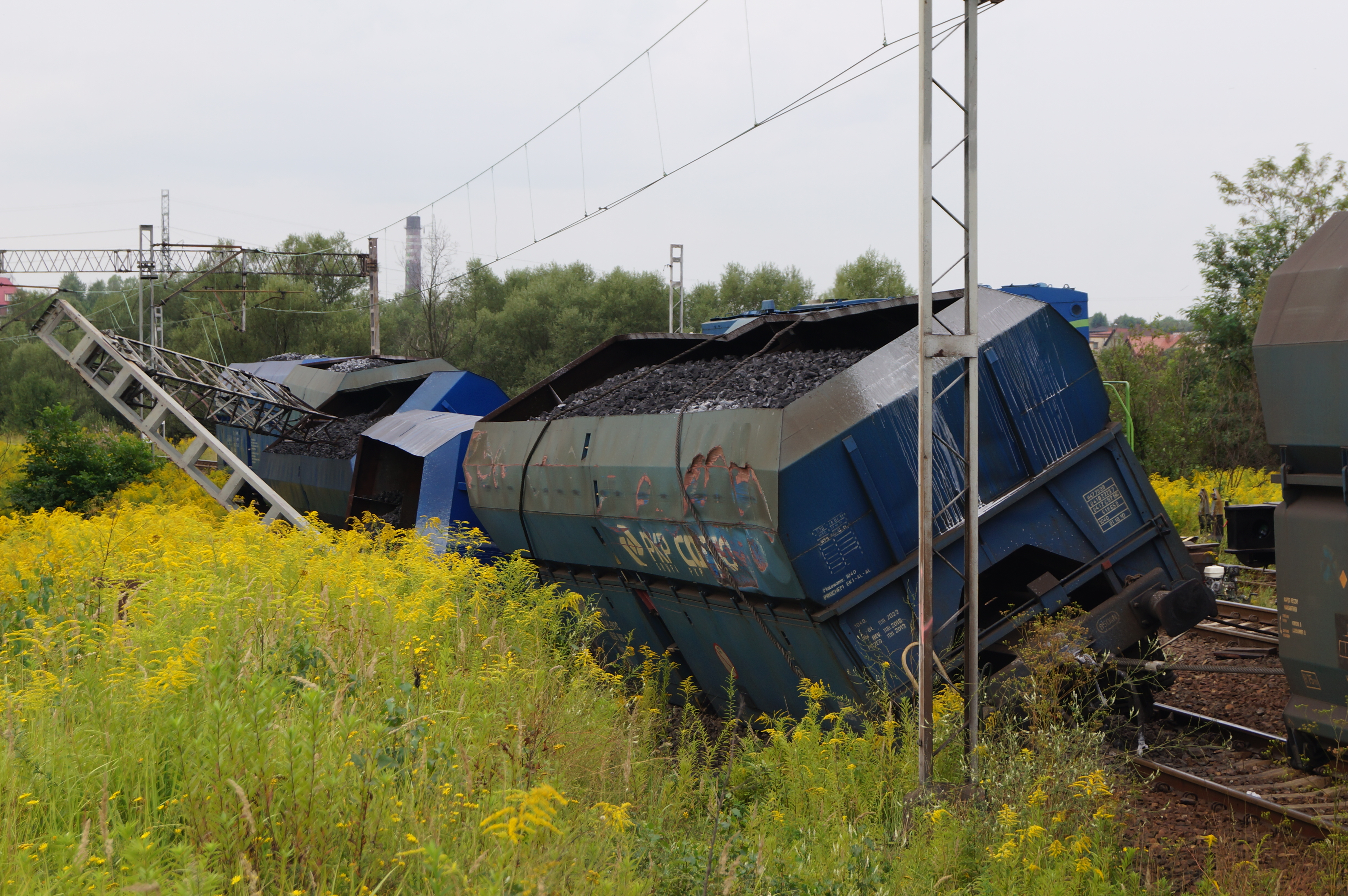 Wykolejenie Rybnik-Rymer.